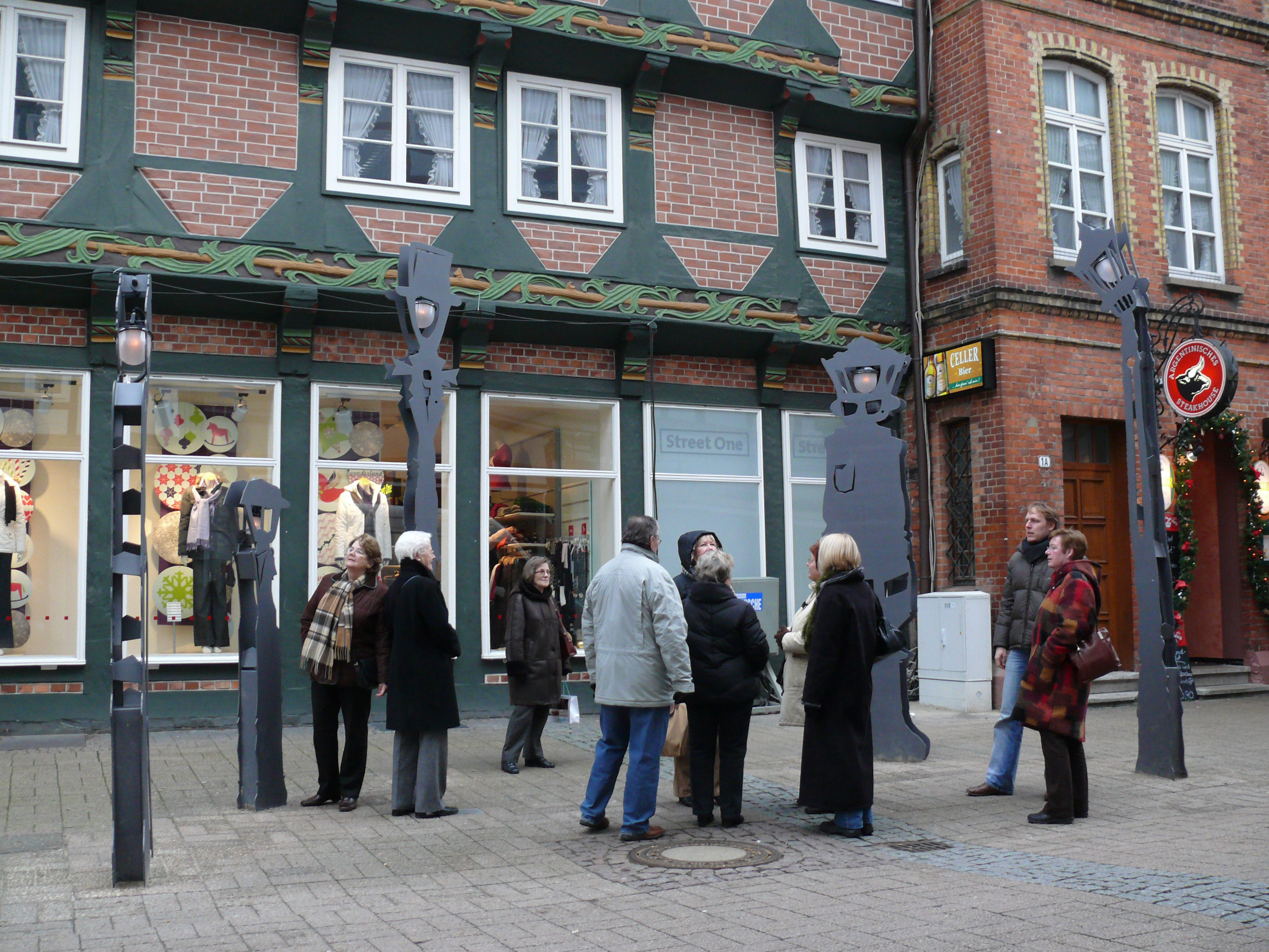 Die Sprechenden Laternen in der Altstadt von Celle mit lauschenden Passanten.